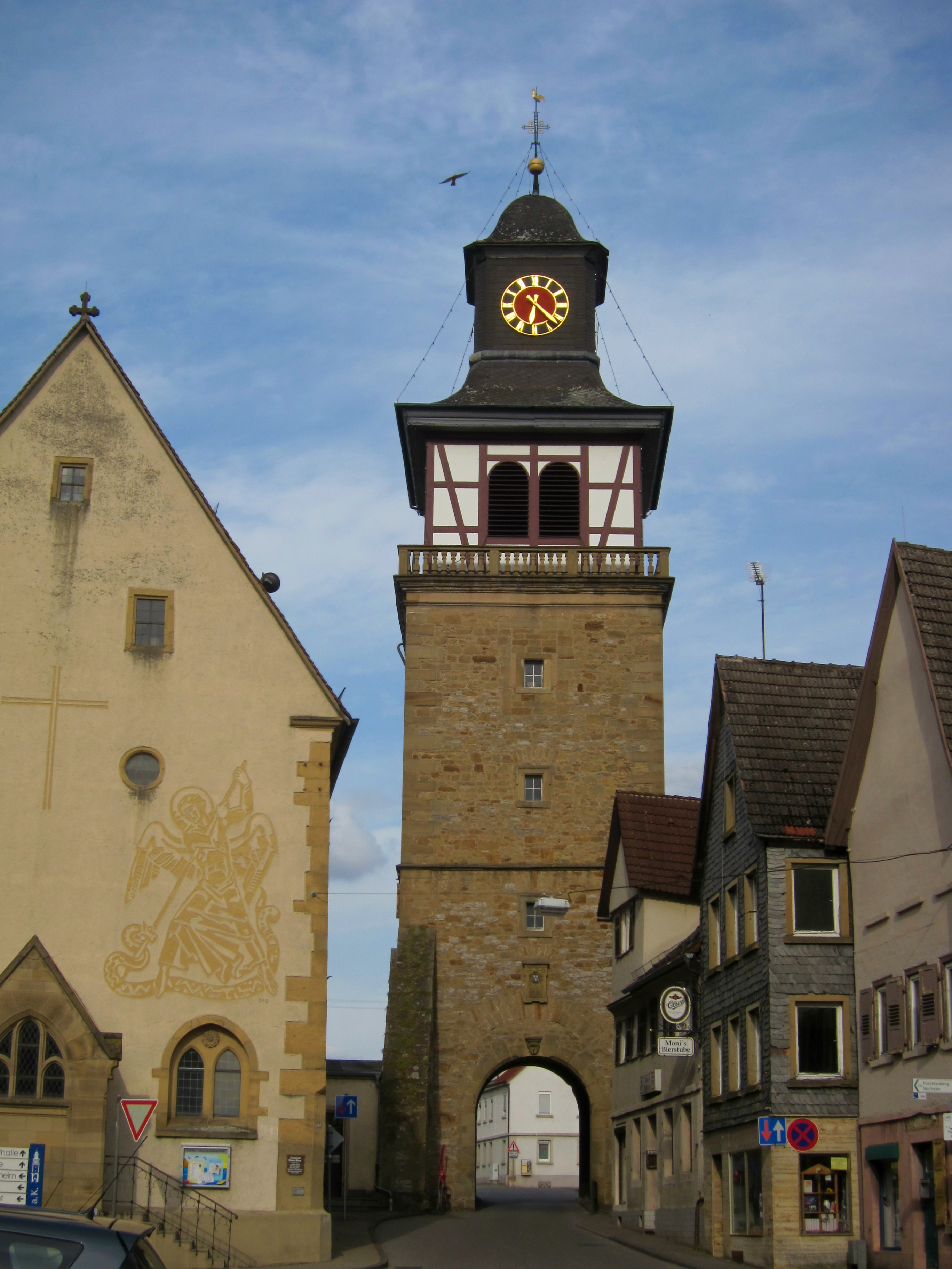 Der Torturm in Neuenstadt am Kocher vom inneren Marktplatz aus gesehen. Links daneben die Nikolauskirche.